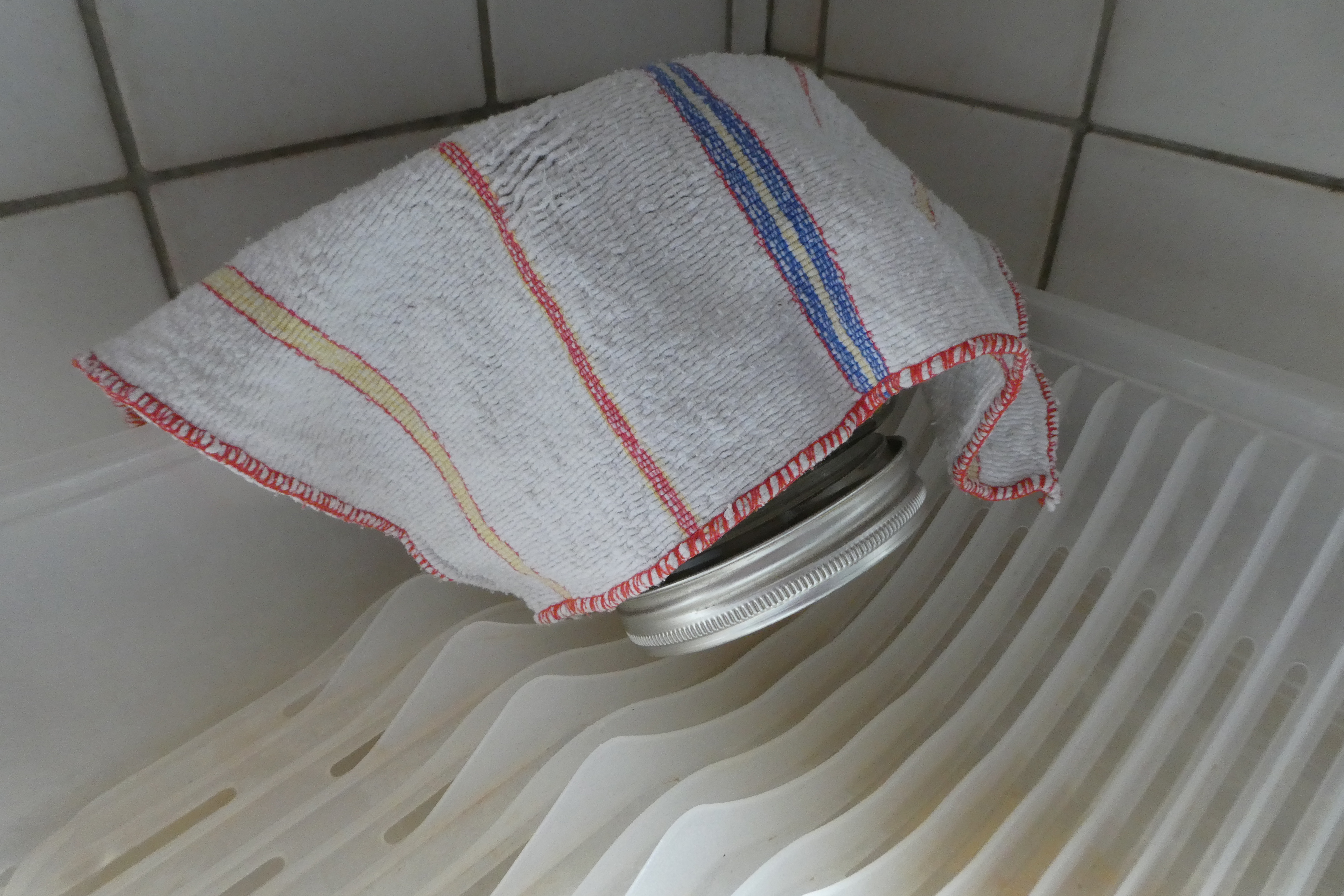 Tiu ujo kun kribrila kovrilo devas stari tiel, por ke la akvo povu elflui.